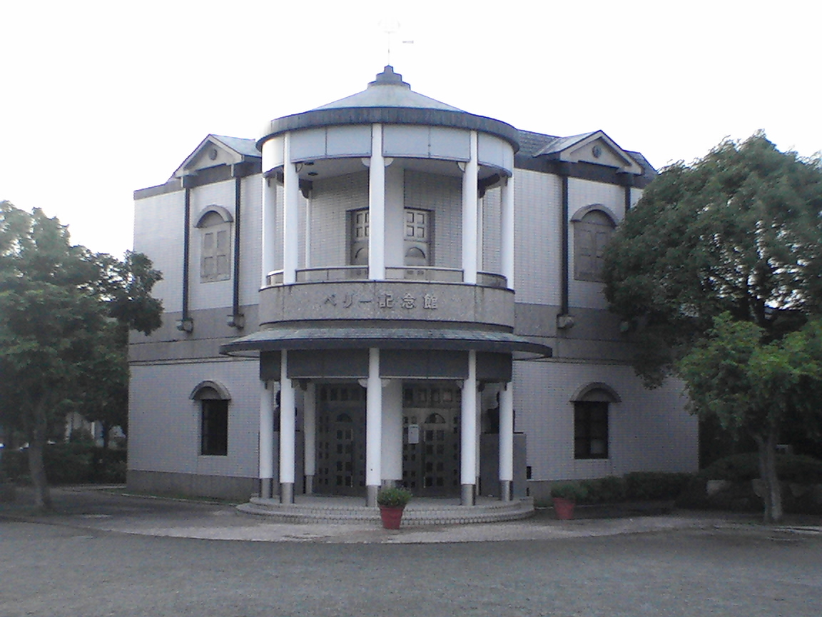 ペリー記念館（横須賀市ペリー公園内）